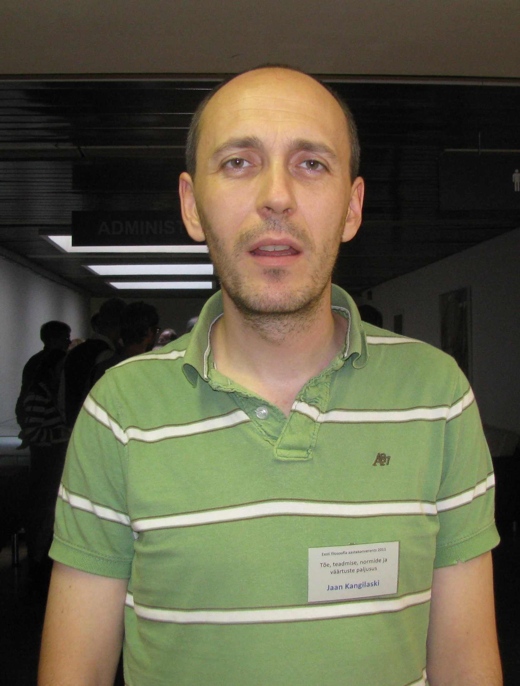 Jaan Kangilaski Eesti filosoofia 7. aastakonverentsil Tartus